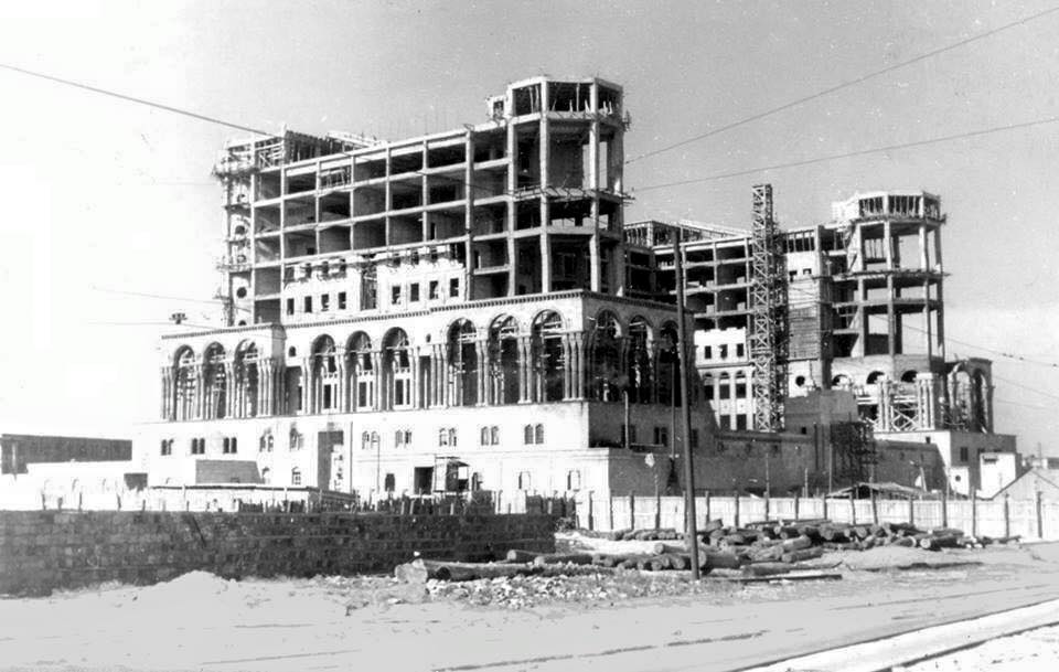 Hökümət evinin inşası, 1939